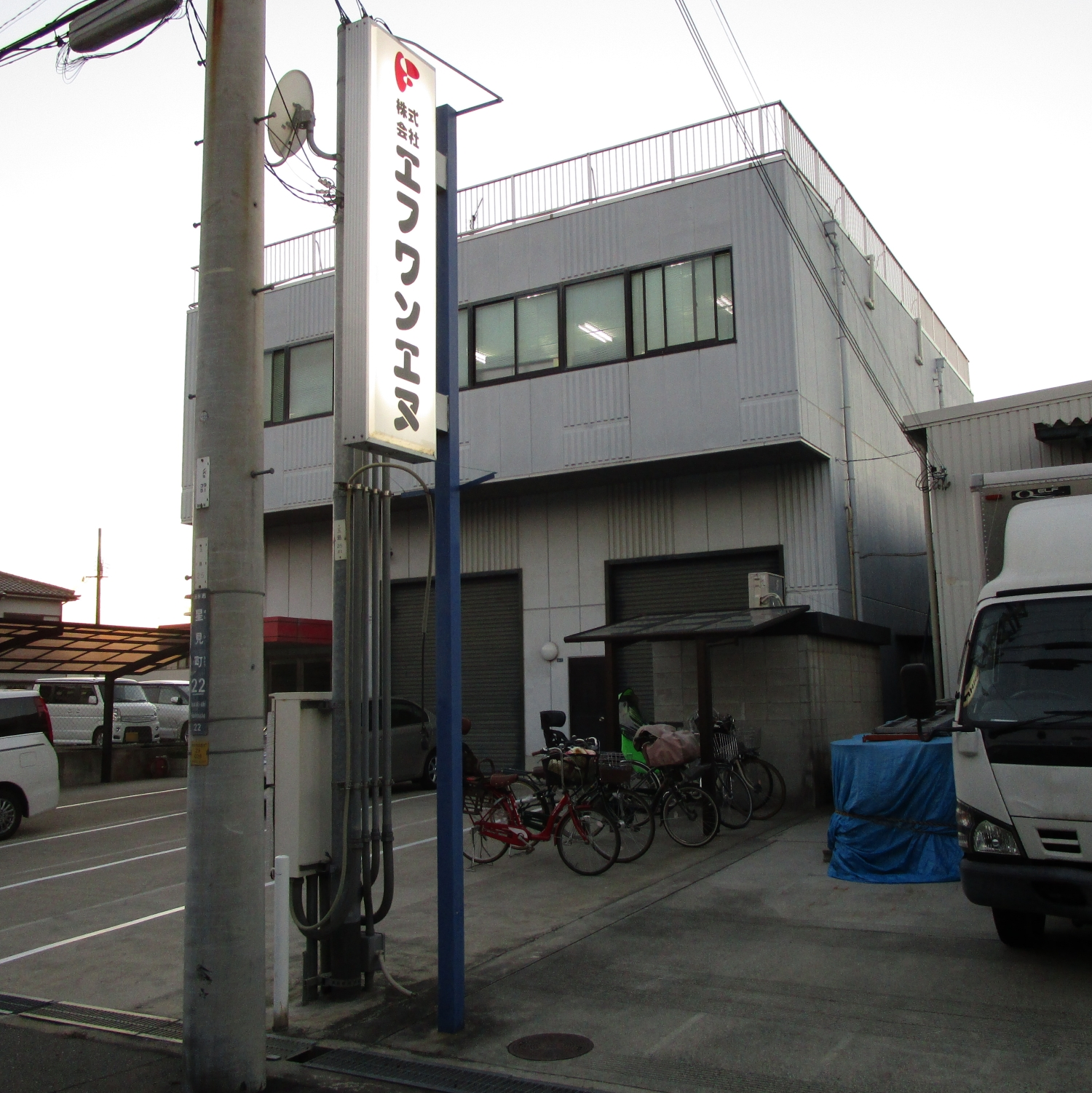 株式会社エフワンエヌ本社